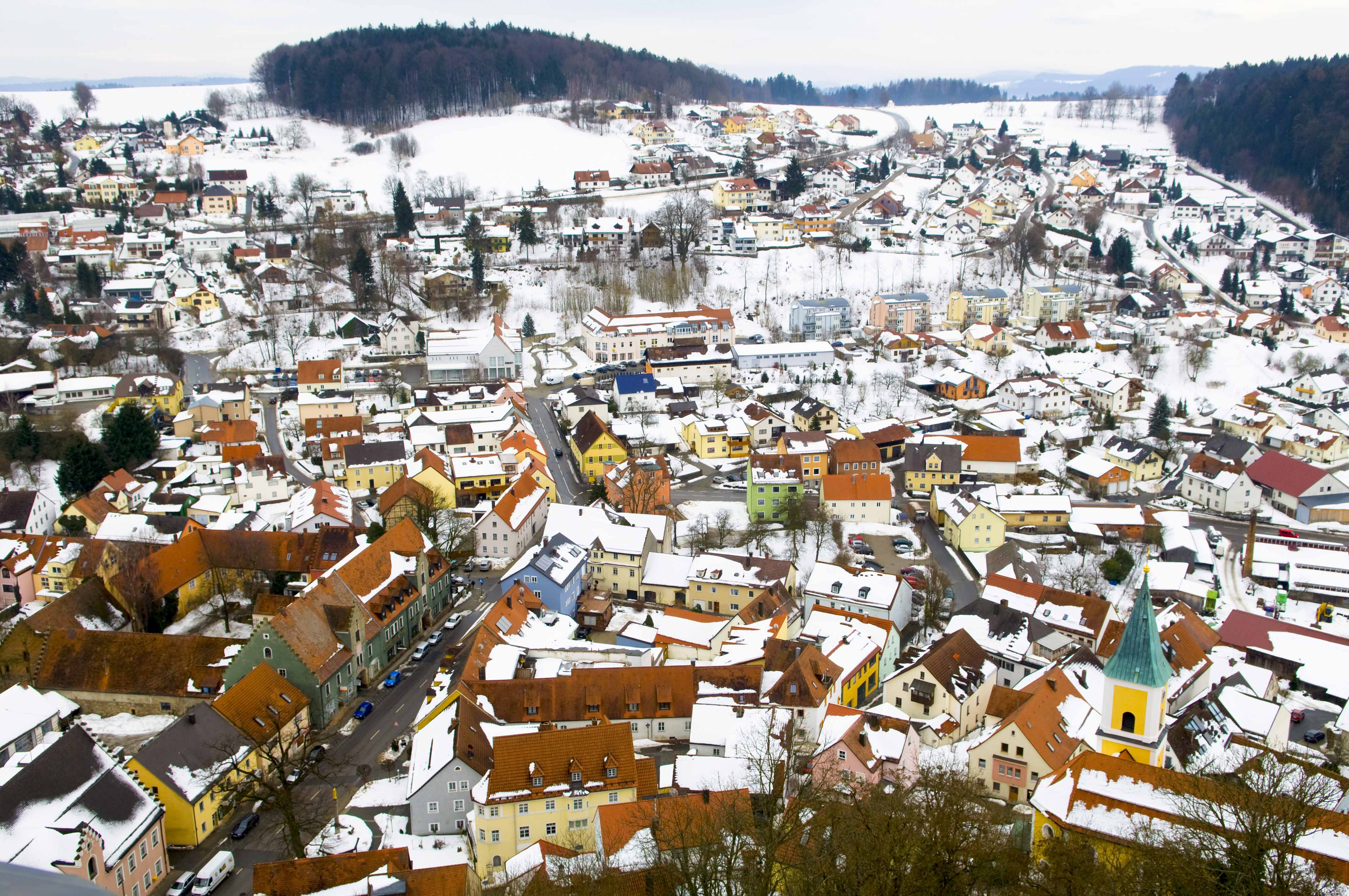 Block vom Turm der Burg Falkenstein/Oberpfalz auf die Gemeinde Falkenstein